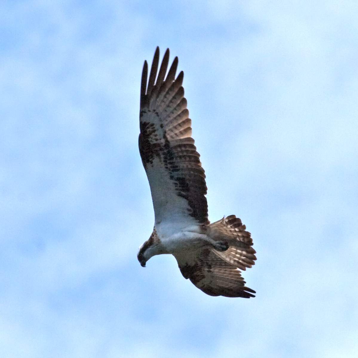 Osprey (fiskgjuse) over Bogesund, Vaxholm, Sweden June 2012